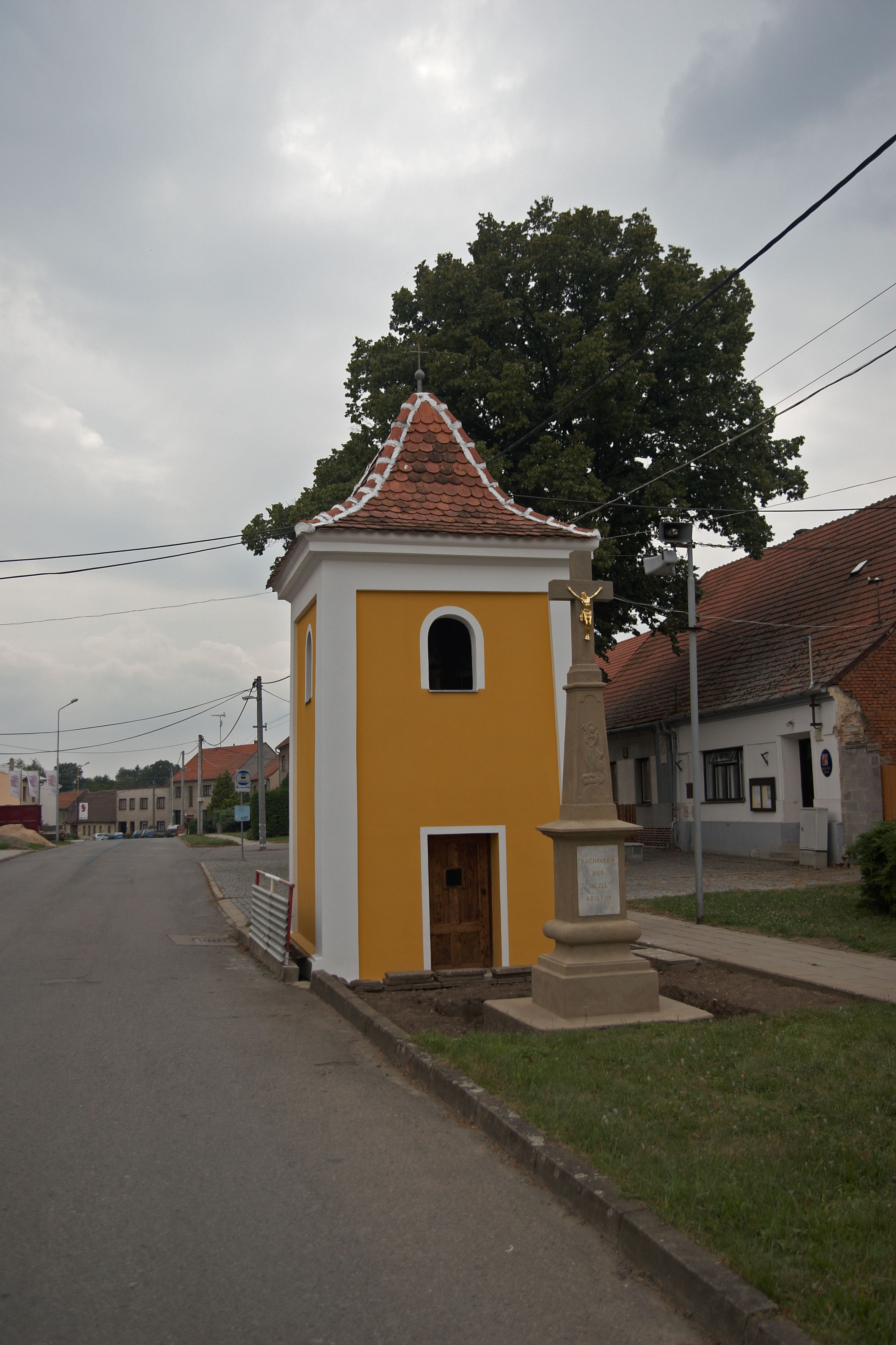 Tučapy - zvonice s křížem